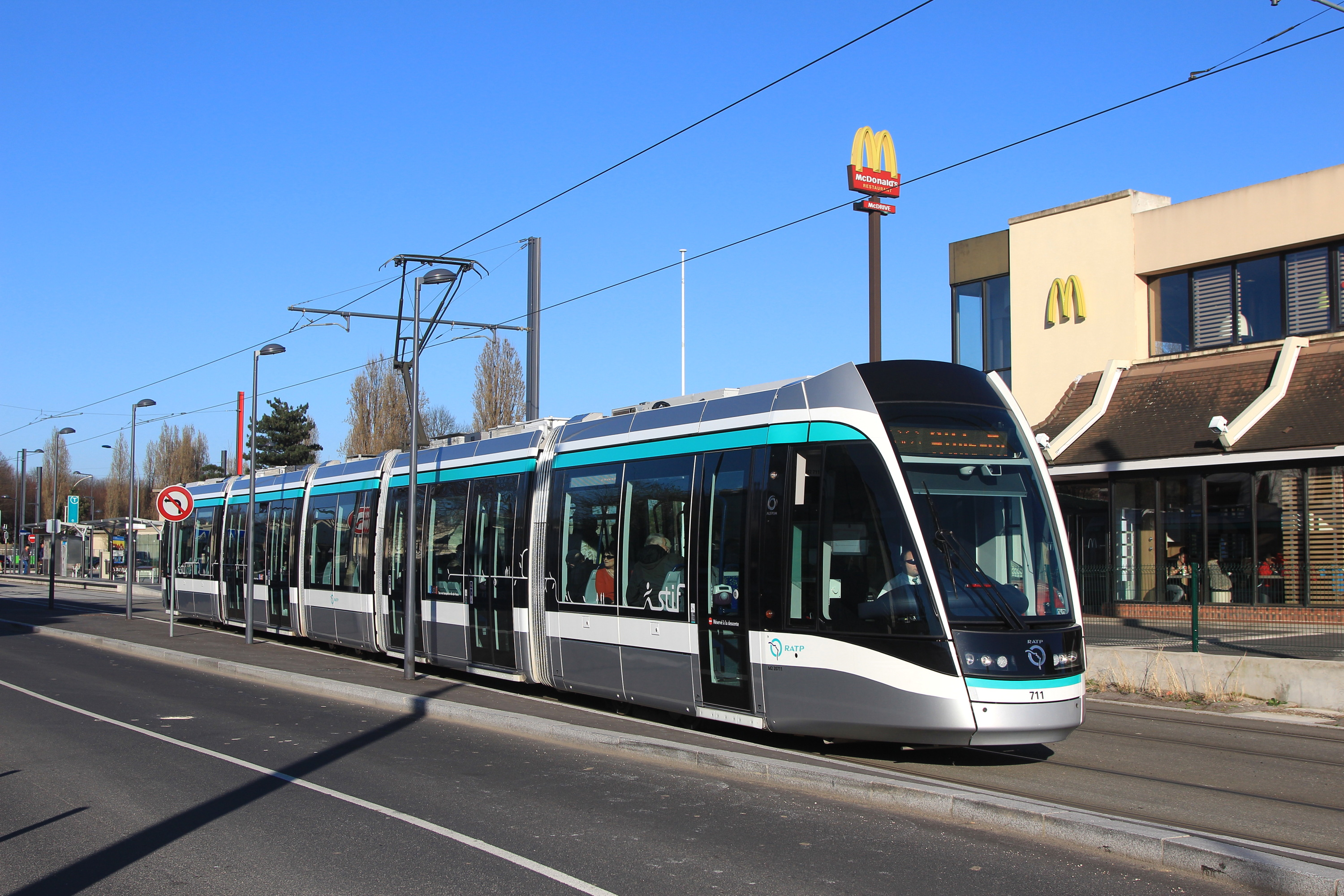 Rame Citadis de la ligne 7 du tramway d'Île-de-France, à l'arrêt Auguste Perret.